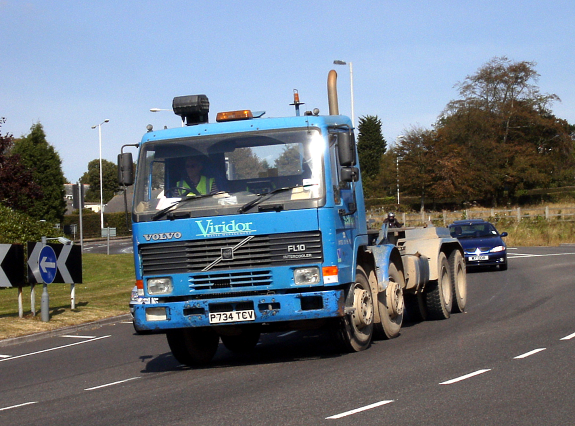 Viridor P734TCV September 2002 Volvo FL10